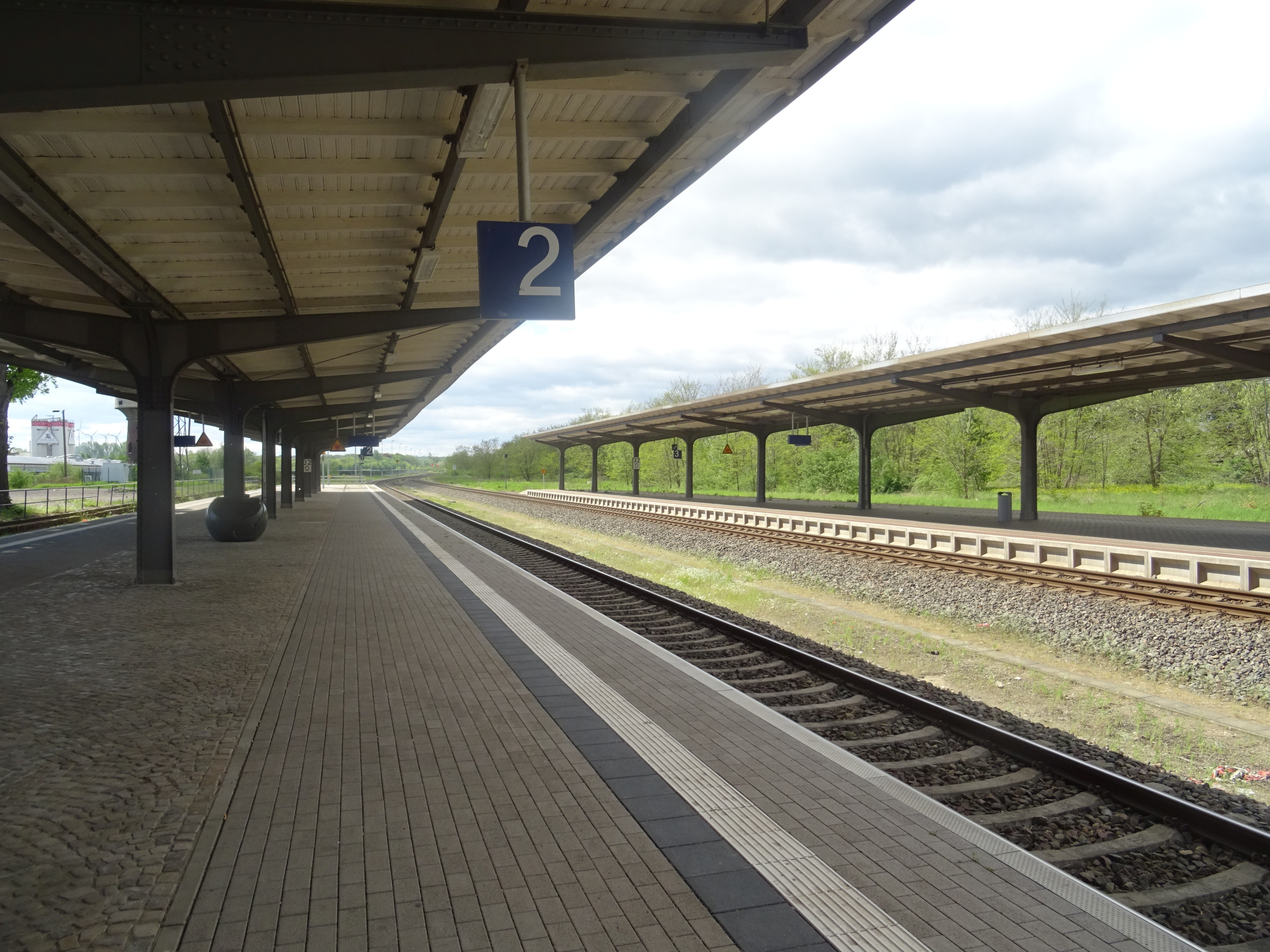 Bahnhof Güsten, Kulturdenkmale, Bahnsteige